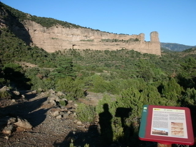 Aragonés: A Penya Falconera en Morrano (Uesca).